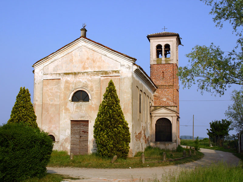 La Pieve di San Giovanni di Vespolate foto by Alessandro Vecchi - 2007